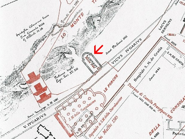 Pianta di Lanciani